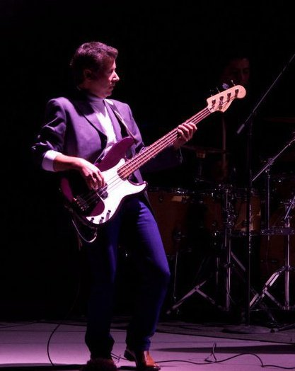 Mexican Musician, Songwriter, Producer, Sound engineer, studio and concerts, Broadcast production. Músico Mexicano, compositor, productor musical, ingeniero de sonido, en estudio y concierto, producción de radiodifusión.